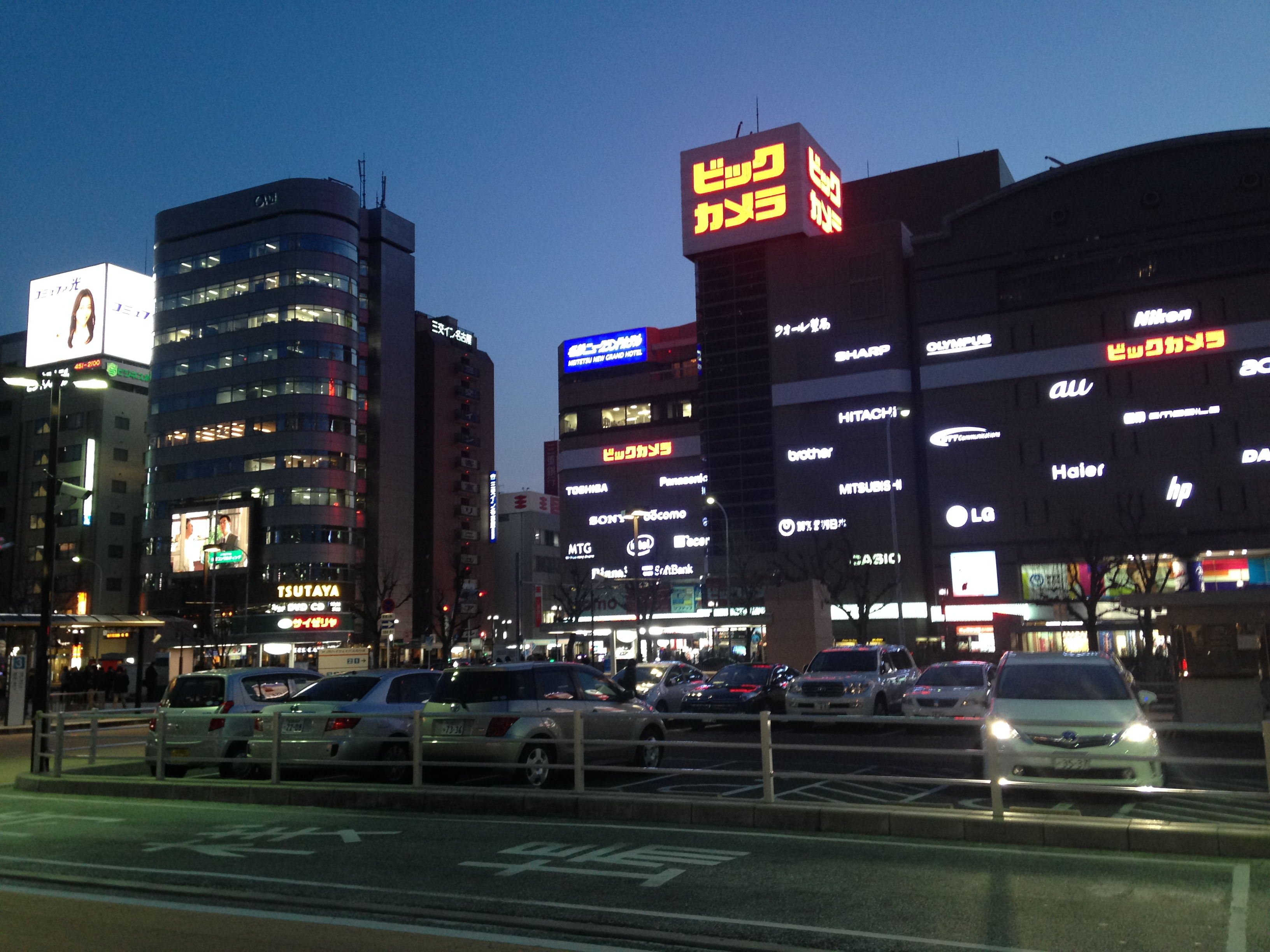 名古屋駅・太閤通口の駅前風景